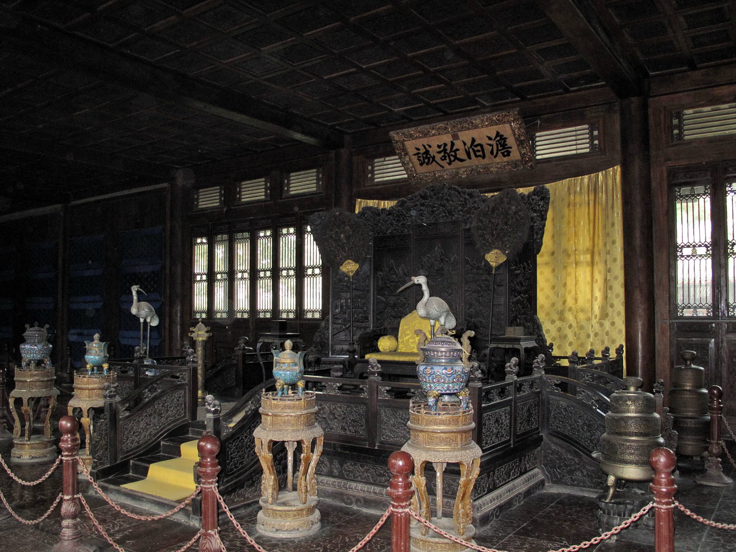 承德避暑山庄正宫的"澹泊敬诚"殿, 又称“楠木殿”, 殿堂正中悬挂康熙帝题“澹泊敬诚”匾额.